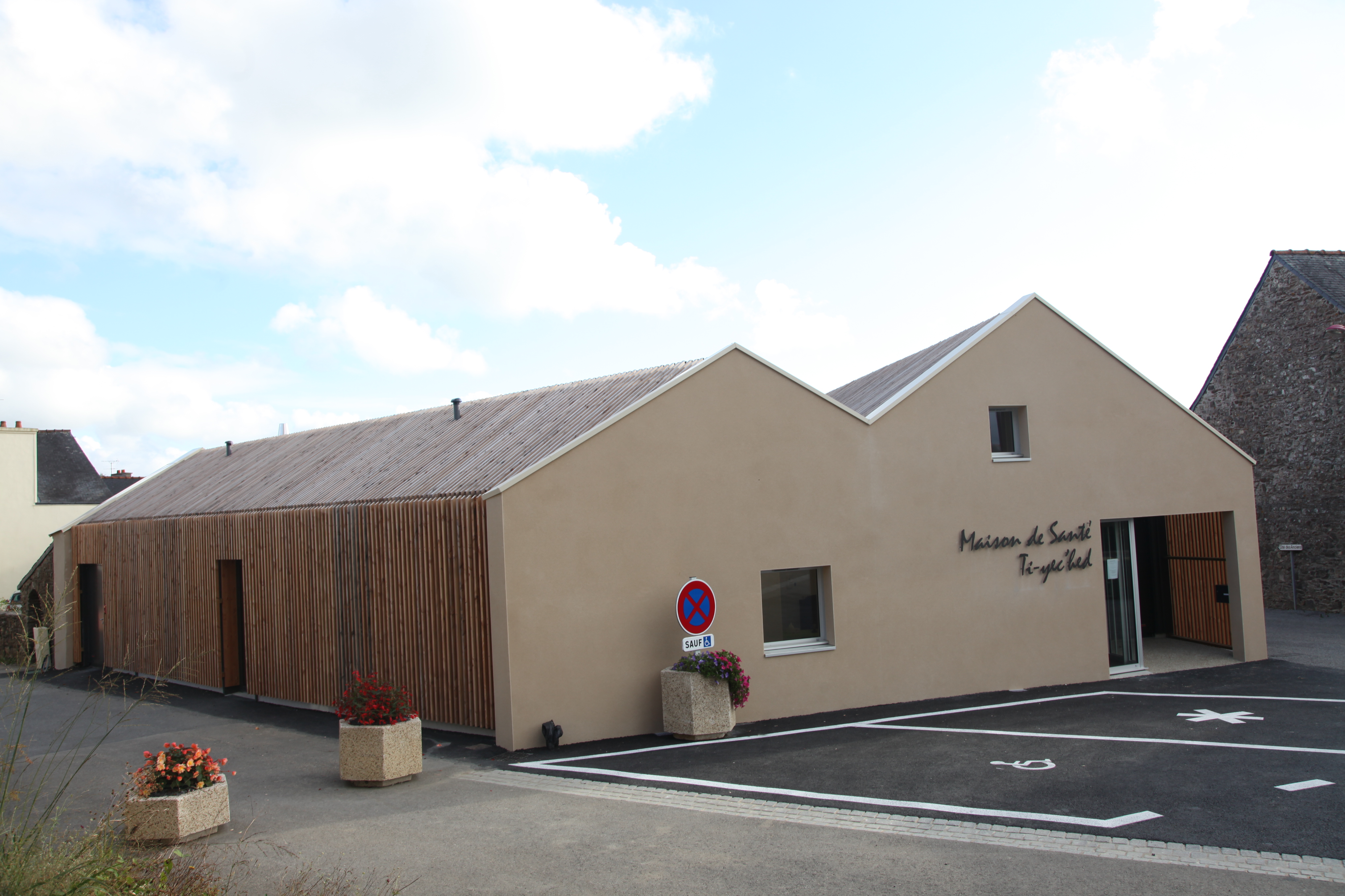 Maison de la santé ouverte le 3 septembre 2018